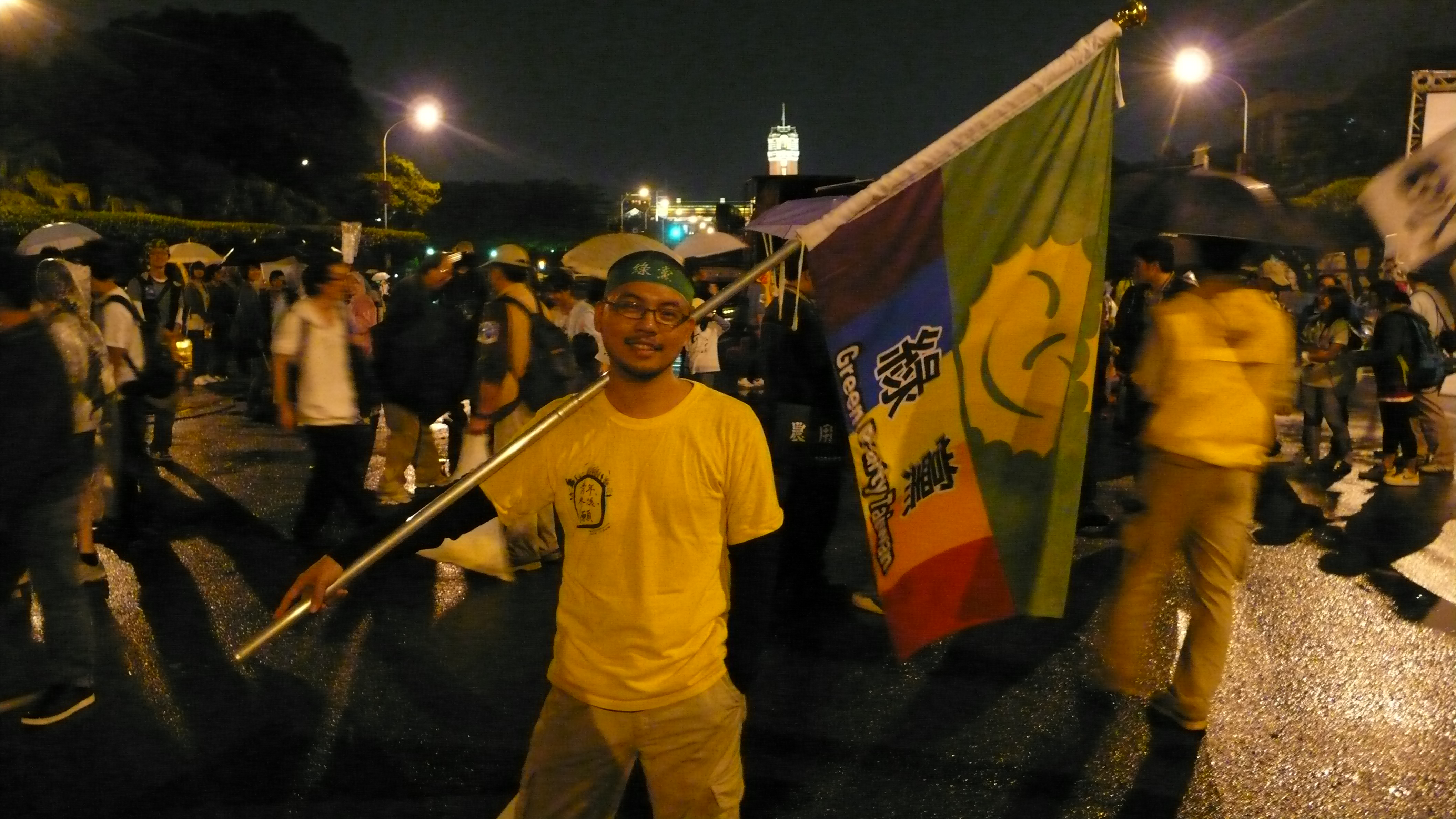 王鐘銘在環保救國大遊行散場後扛著臺灣綠黨黨旗拍照。